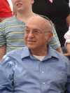 Yaakov Neeman 2007 .2007 יעקב נאמן בטקס חגיגת ל"ג בעומר בבית עבו